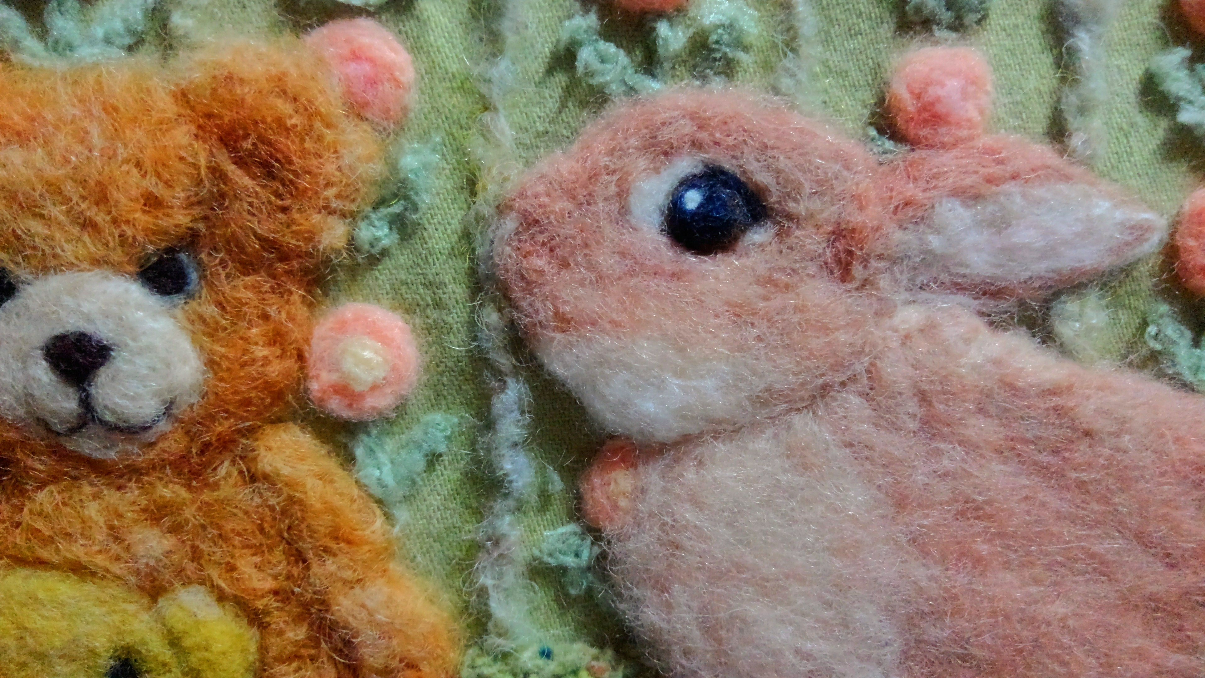 wool, yarn, and ribbon